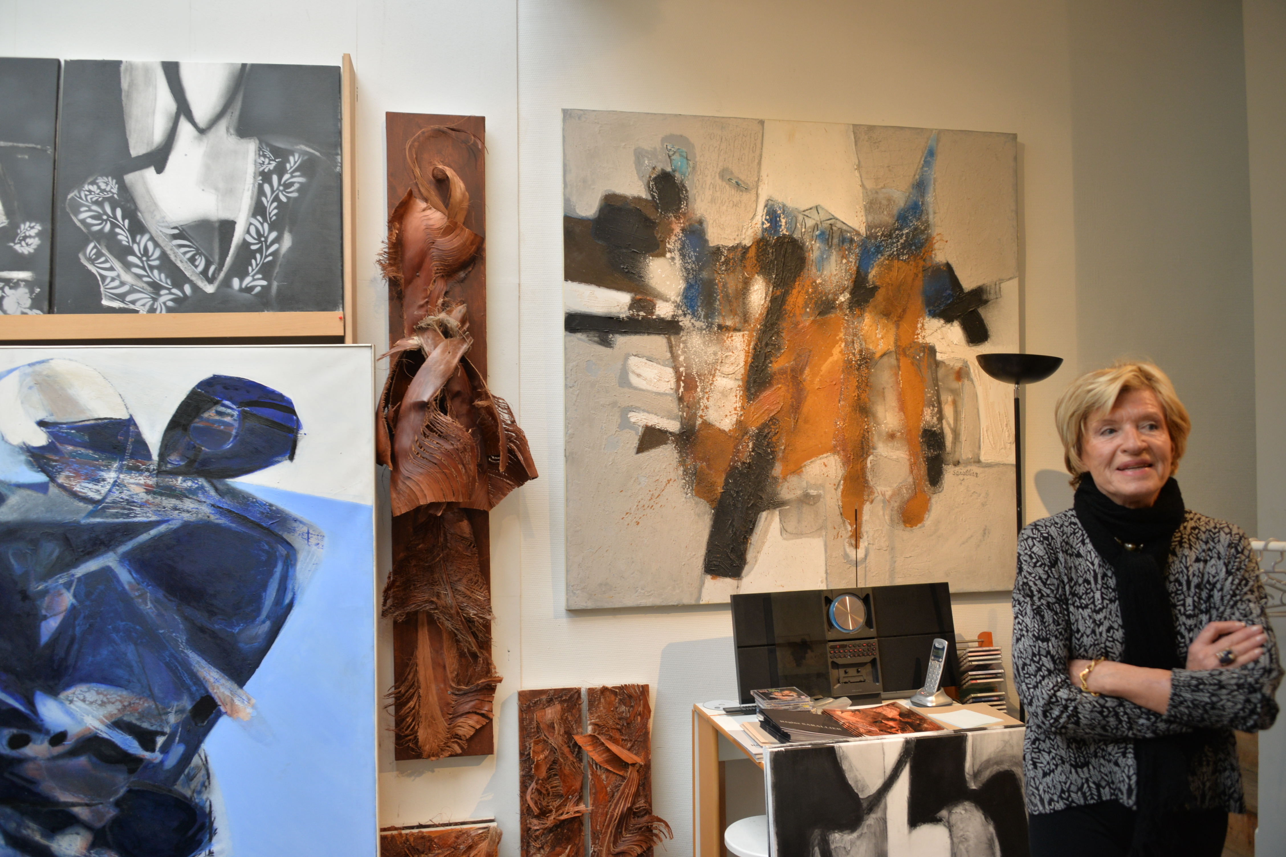 2014 11 23 exposition des artistes Atelier Scumlpture et Tableaux